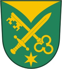 znak obce Želatovic